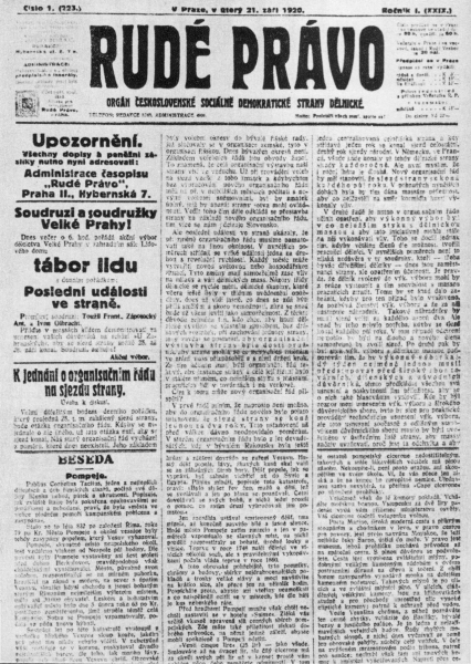 První číslo Rudého Práva